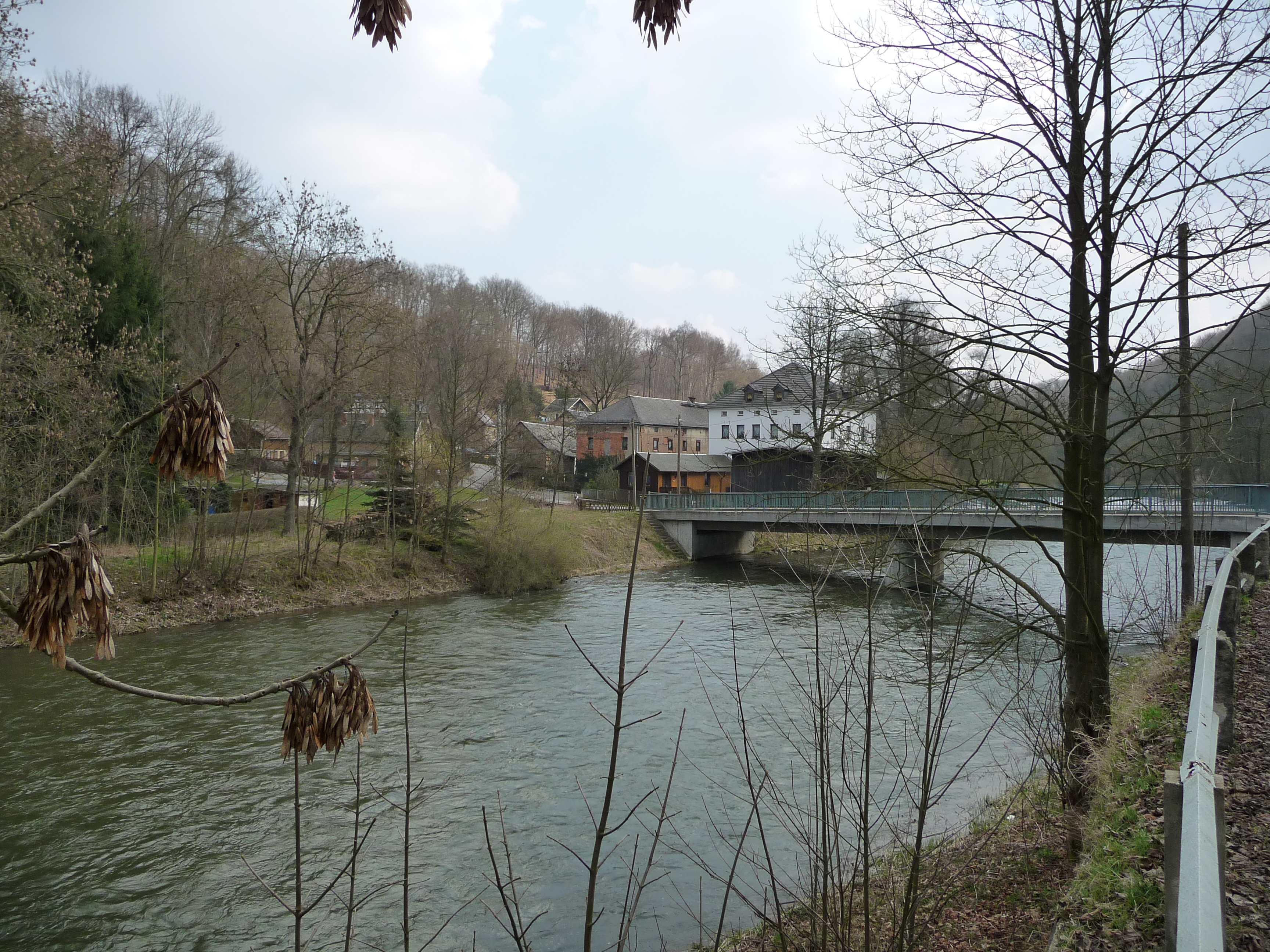 Blick auf Rentzschmühle, Sachsen und Thüringen, Deutschland